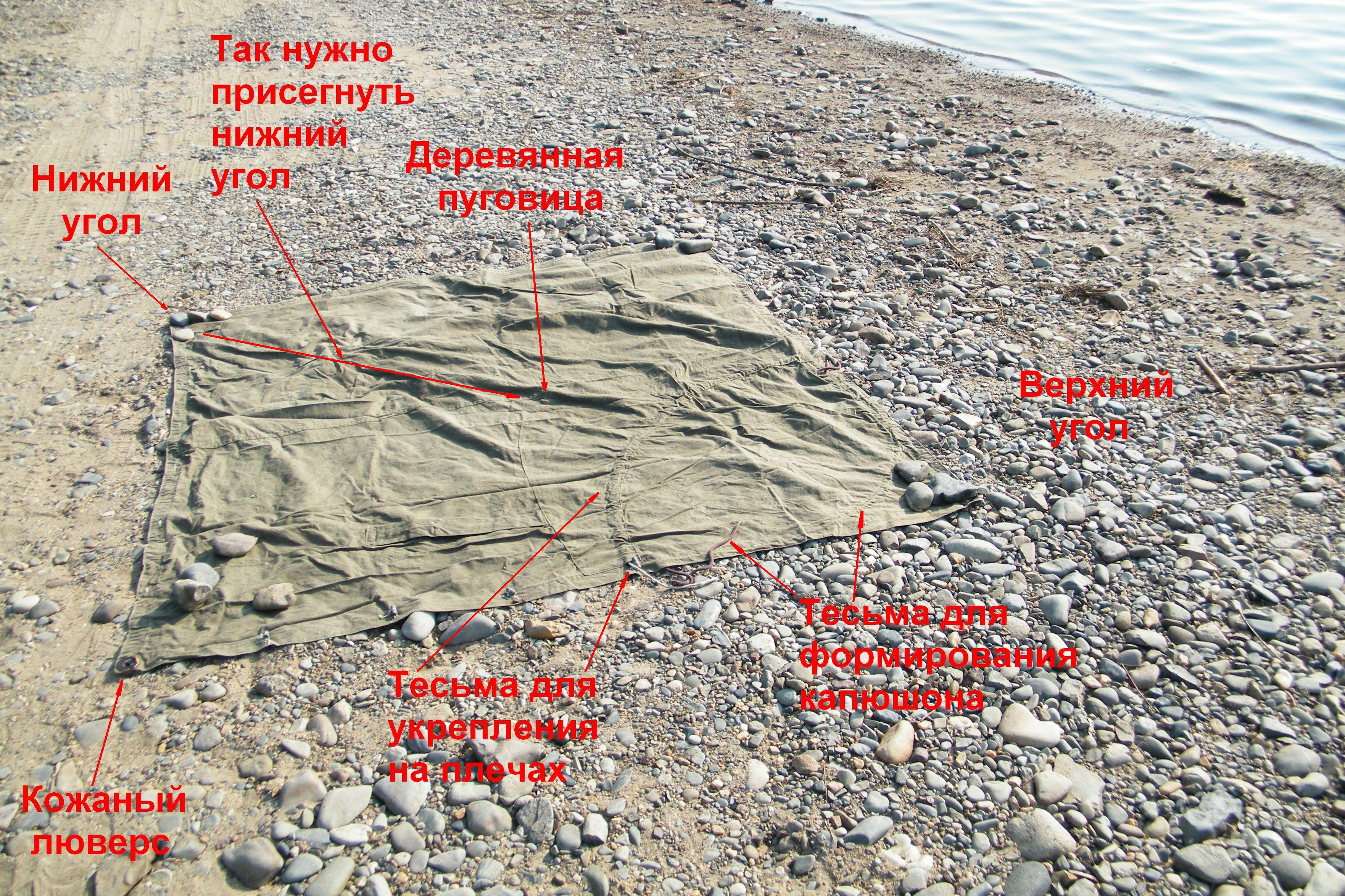 Плащ-палатка, МО РФ, лежит на земле